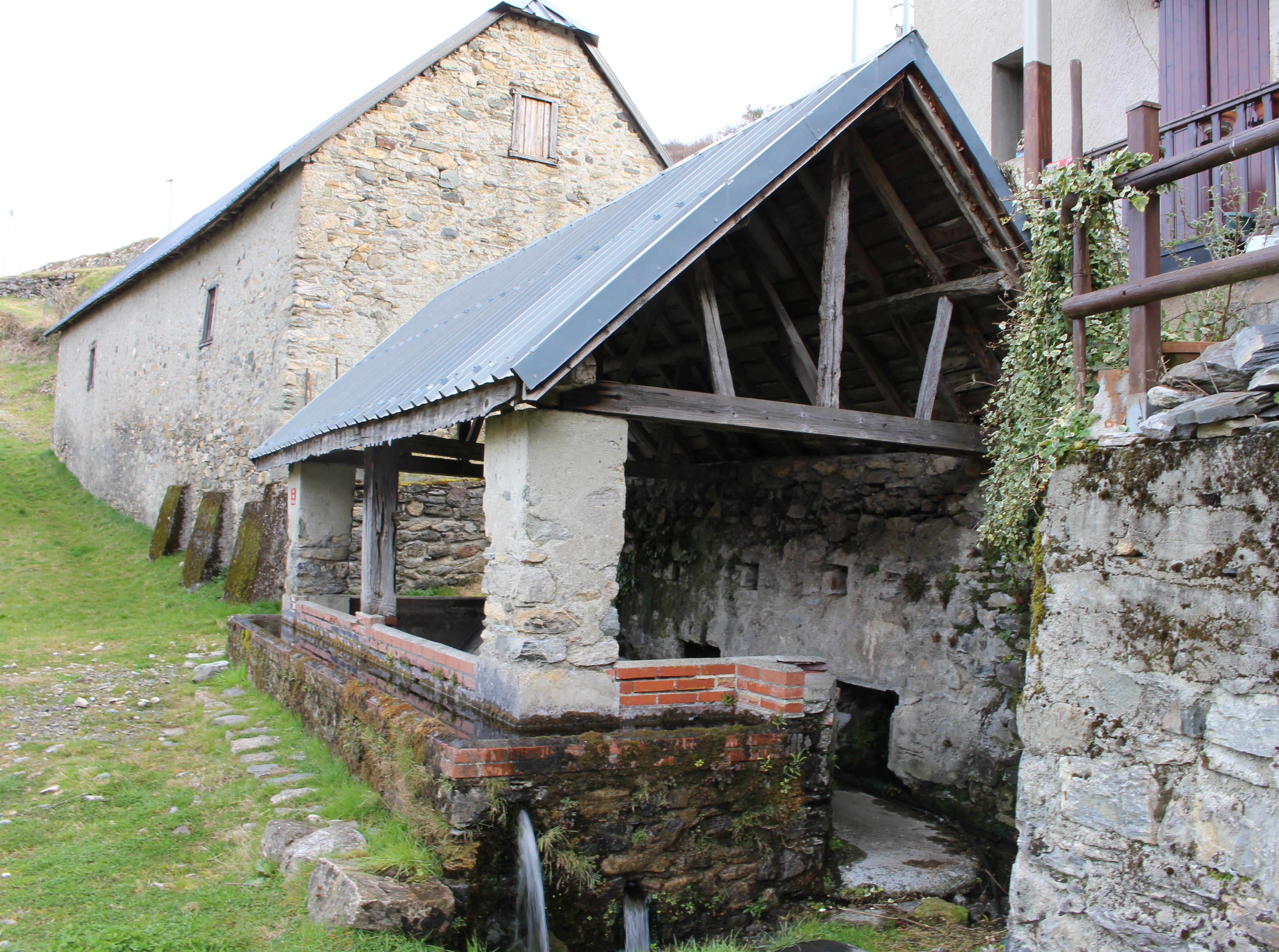 Lavoir de Lias (Hautes-Pyrénées)